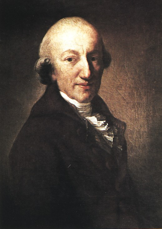 Portrait des Dichters Christoph Martin Wieland.